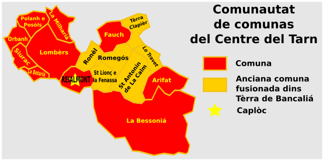 Mapa de la Comunautat de Comunas del Centre del Tarn